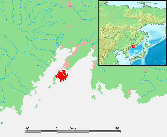 Het eiland Roesski ten zuiden van Vladivostok. Het miniscule groene vierkantje ten noorden ervan is het eilandje Jeleny, dat in 1898 werd afgescheiden van het eiland door een kanaal.